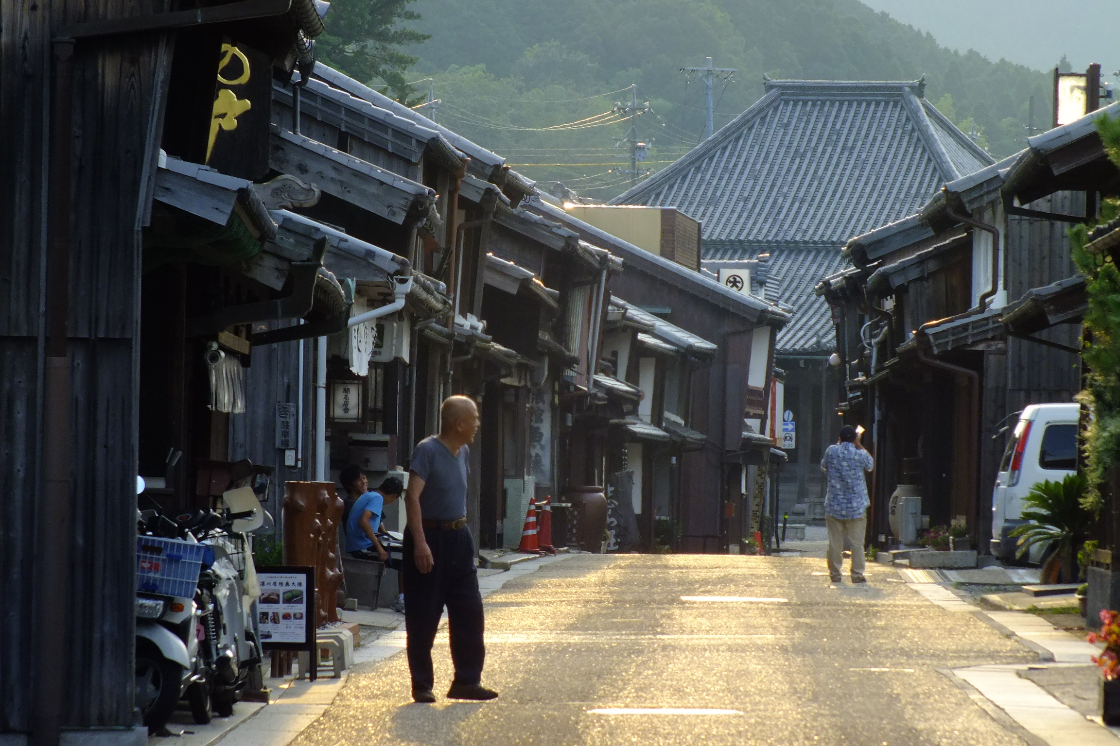 2016-08-05 Tokaido Seki Juku Kameyama City Mie,東海道五十三次 関宿